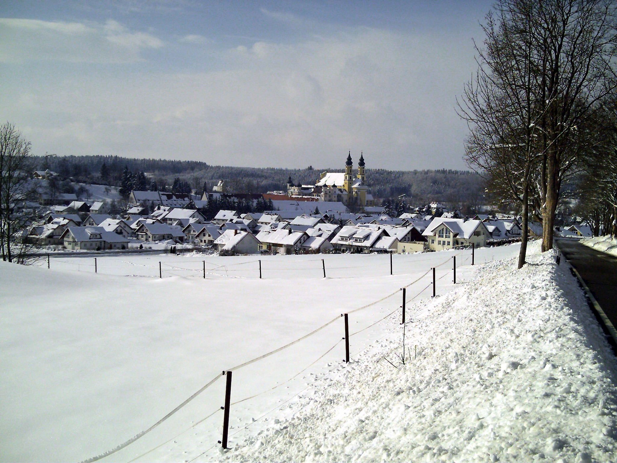 Gemeinde (88430) Rot a. d. Rot, Landkreis Biberach, Baden-Württemberg, Deutschland